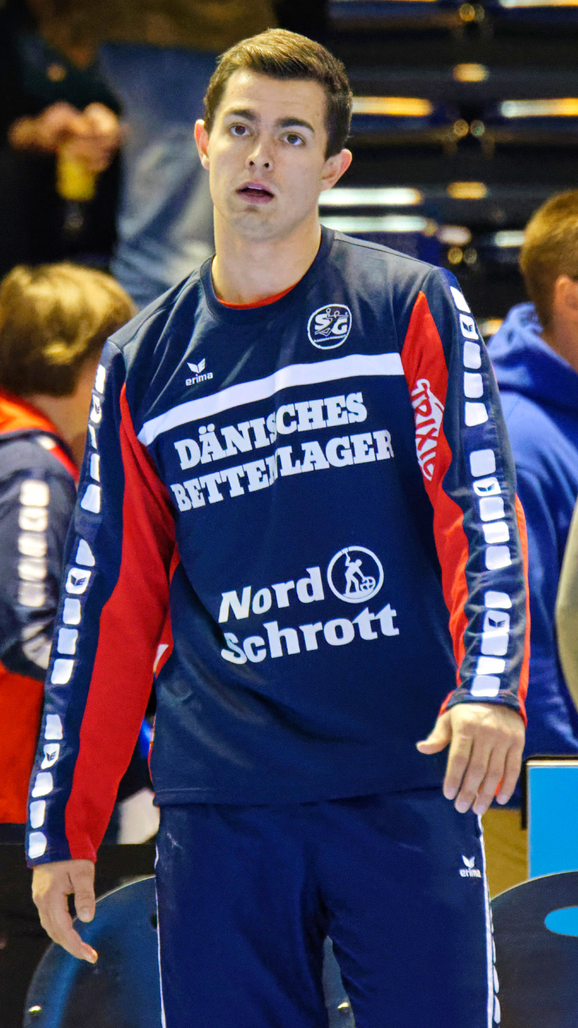 Rencontre de phase de groupe de la Ligue des Champions 2015-16 entre le PSG et SG Flensburg. A la Halle Carpentier (Paris), le 7 mars 2016.